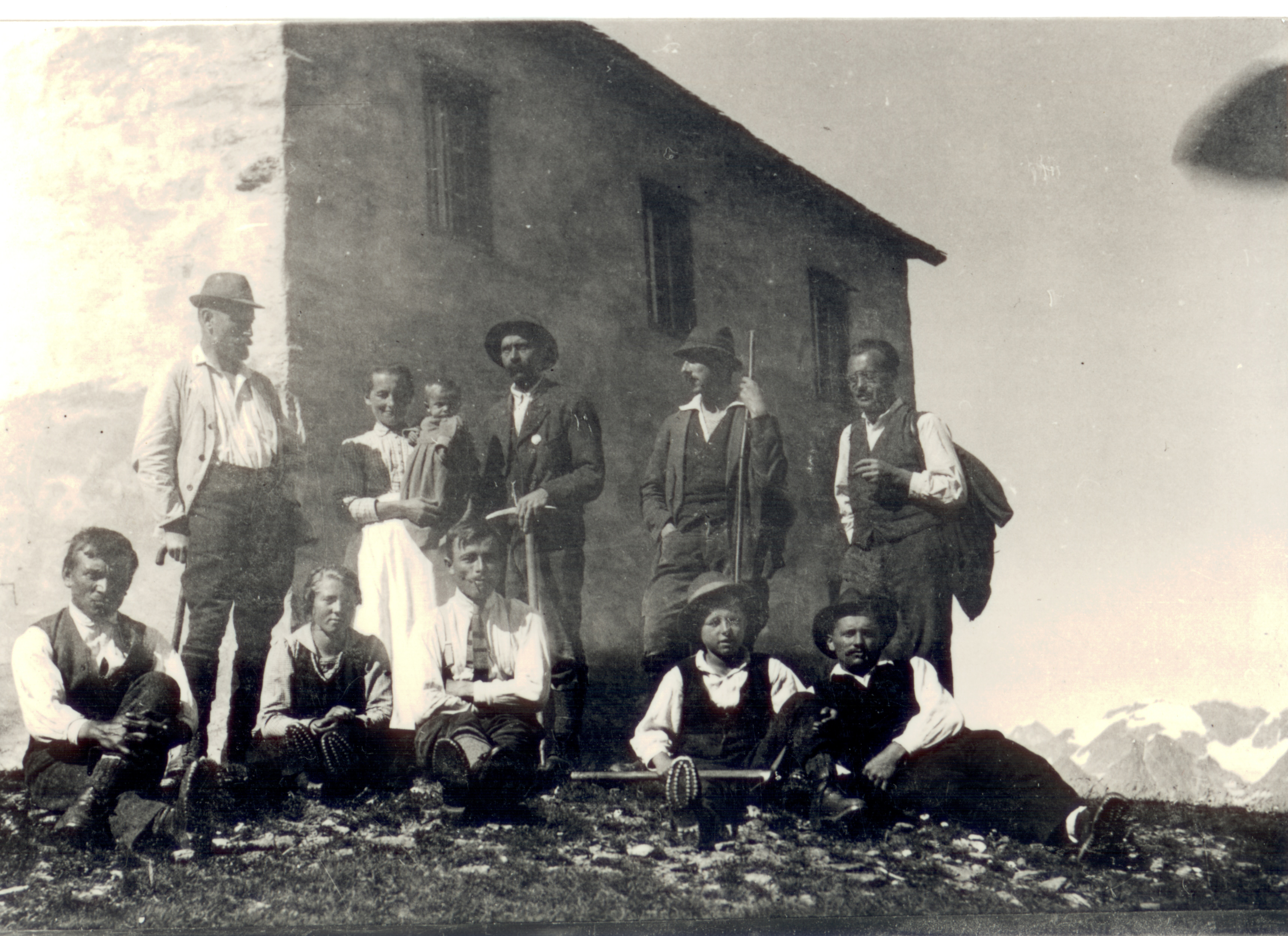 Stettinerhütte um die Jahrhunderwende